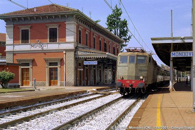 Stazione ferroviaria di Mondovì. In sosta un treno trainato dalla locomotiva E.636.065.